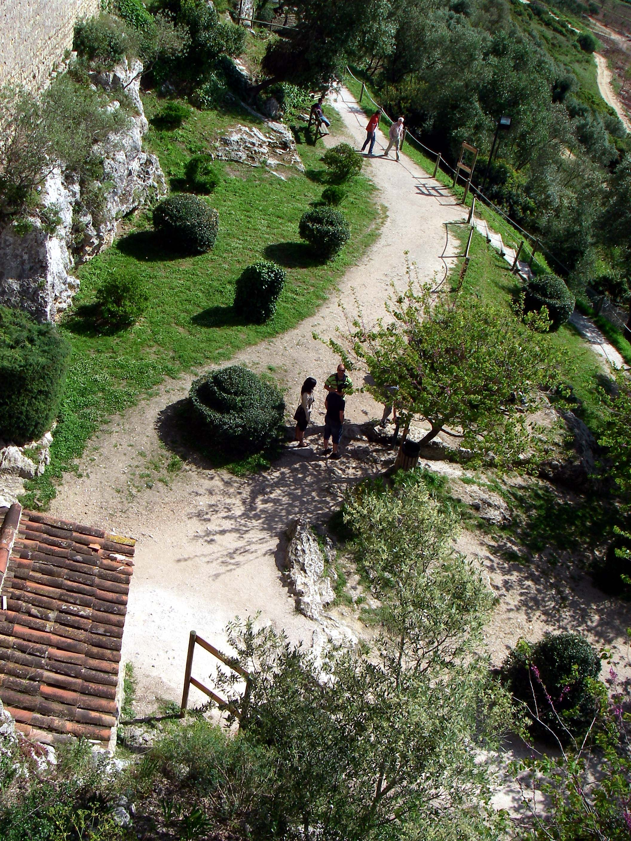 Castelo de Óbidos e todo o conjunto urbano da vila This file was uploaded for Wiki Loves Monuments in Portugal with the unique identifier 70427.